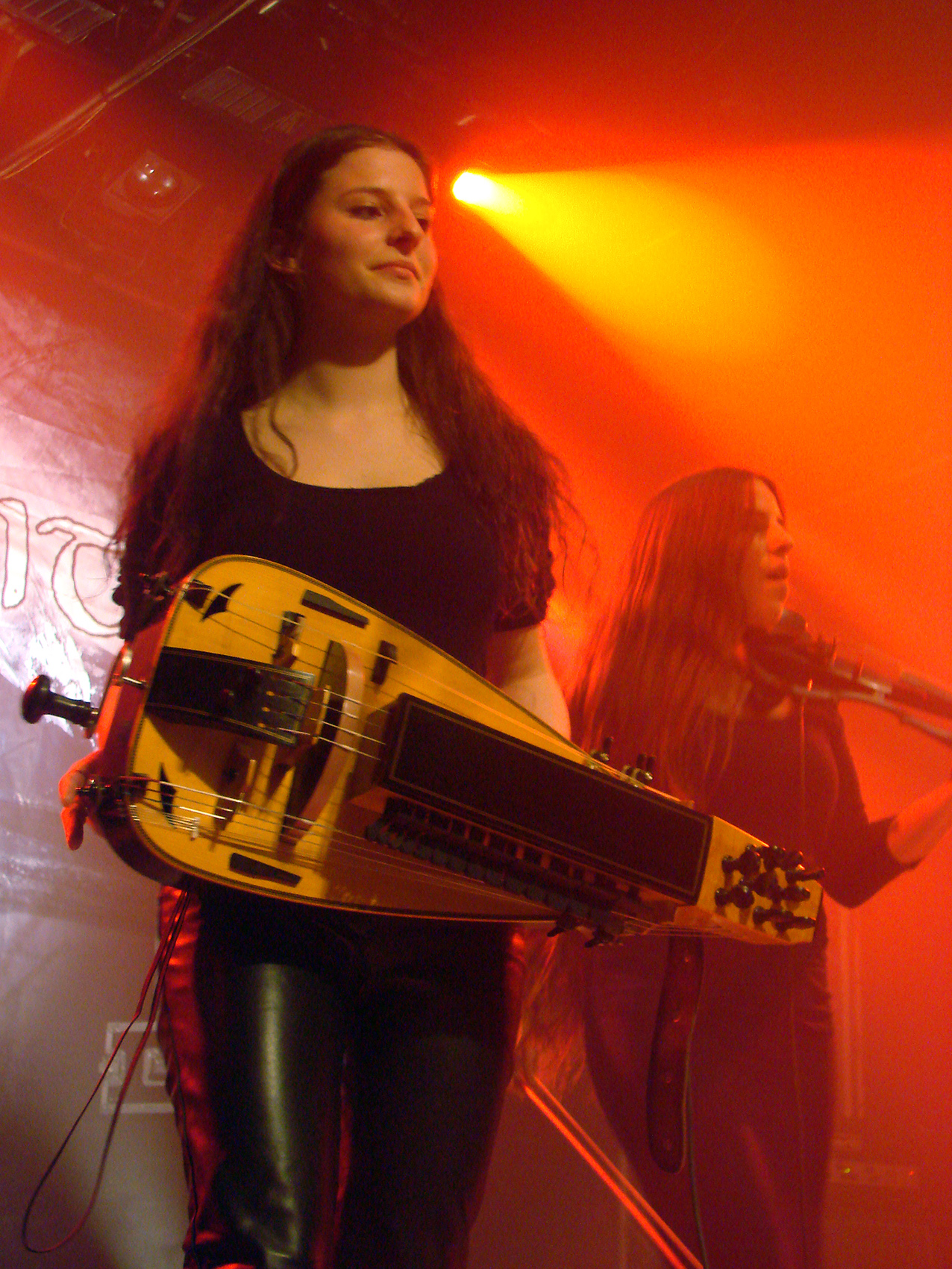 Eluveitie au Cernunnos Fest 07, le 16/12/07 à la Locomotive, Paris.